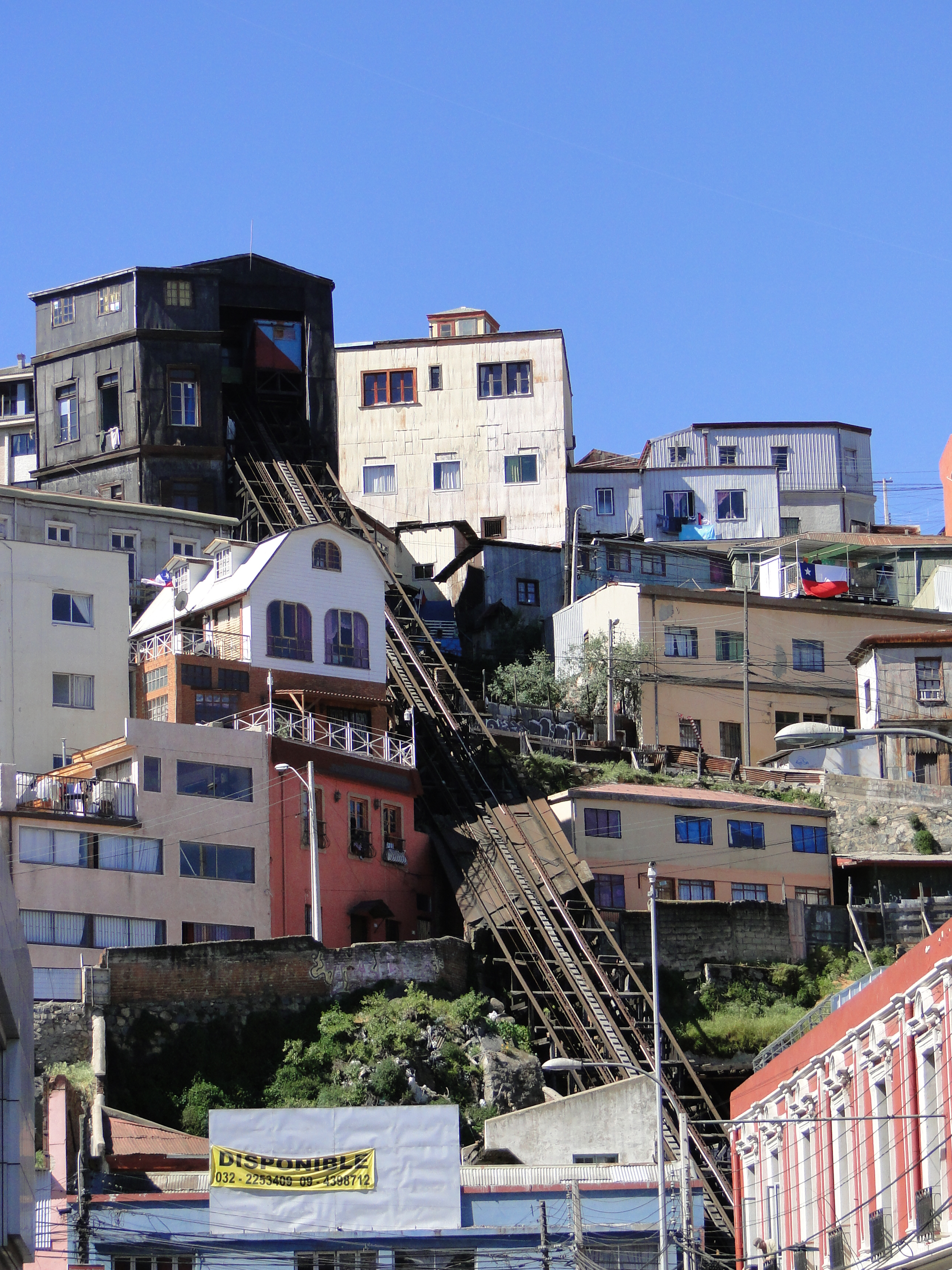 Ascensor Lecheros This is a photo of a national monument in Chile: 779